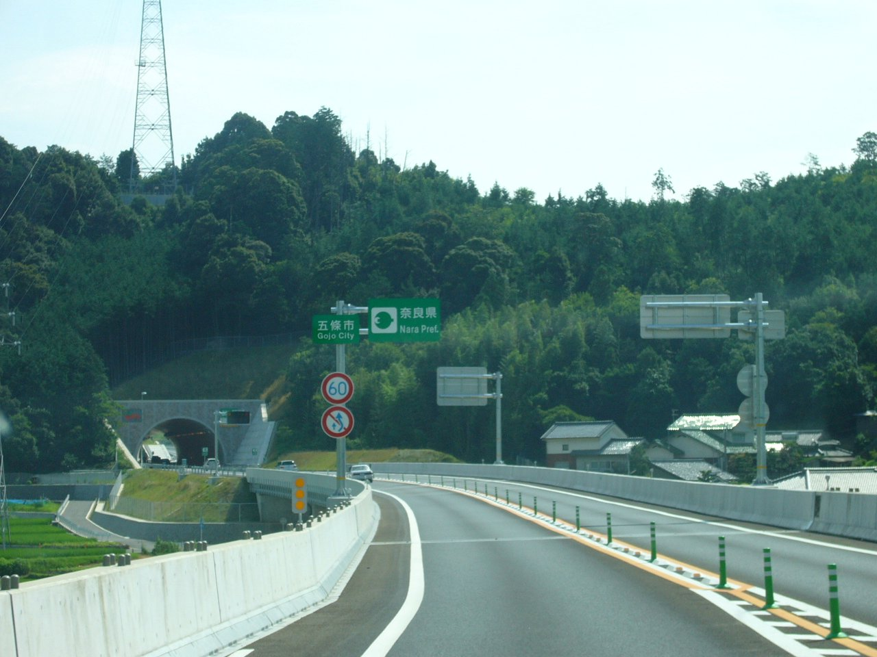 京奈和自動車道 橋本道路（和歌山県；手前）とja:五條道路（奈良県；向こう側）の境界は、両県の県境である